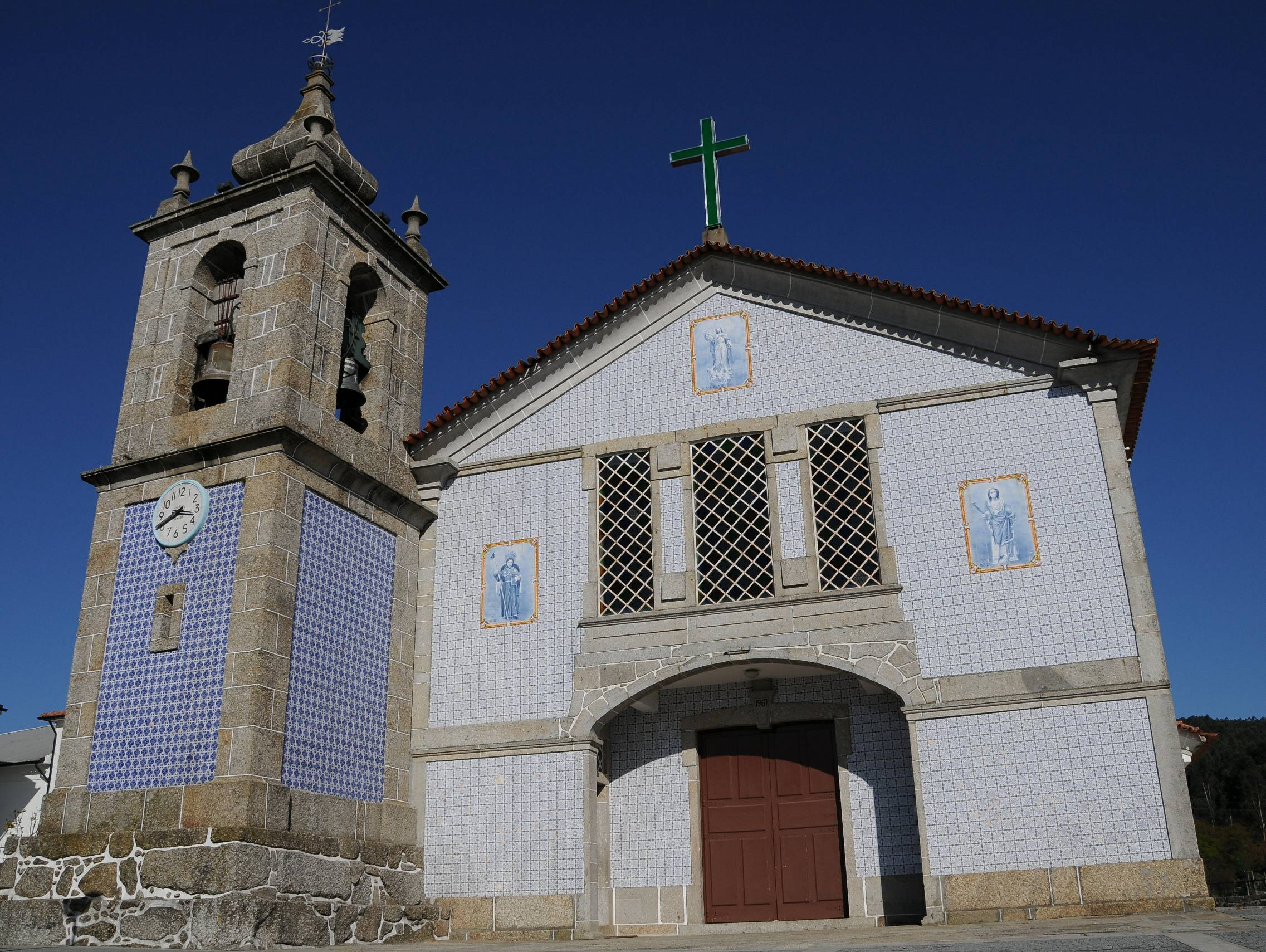 Esporoes Church in Braga, Portugal